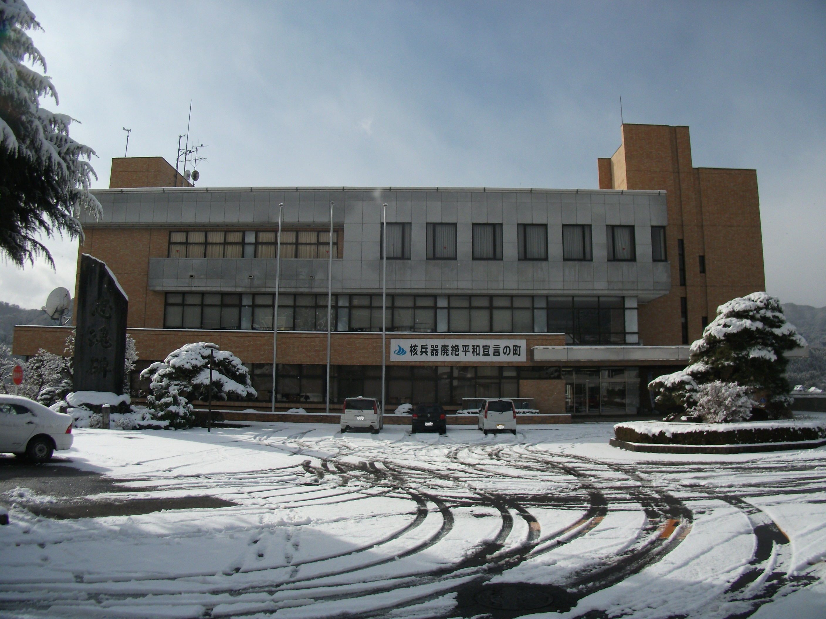 群馬県利根郡みなかみ町役場